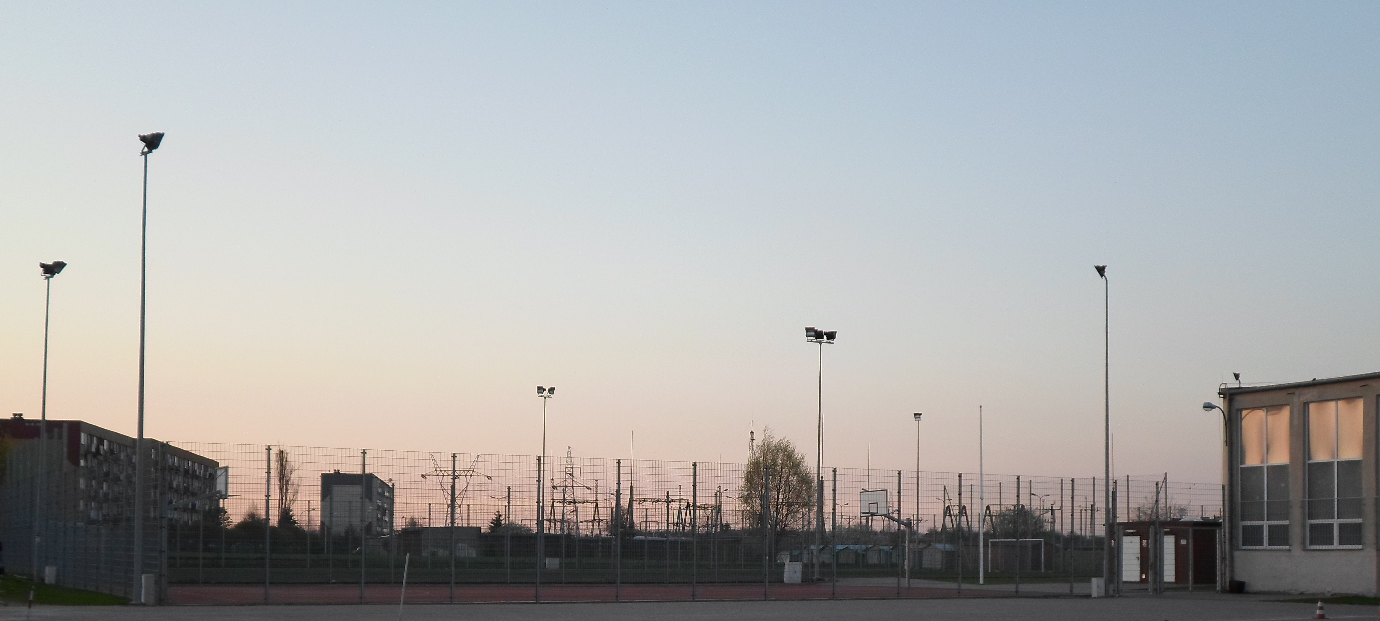 Kompleks boisk "Orlik 2012" przy Zespole Szkół nr 2 im. Krzysztofa Kamila Baczyńskiego w Ełku na osiedlu Północ II, stan na maj 2013